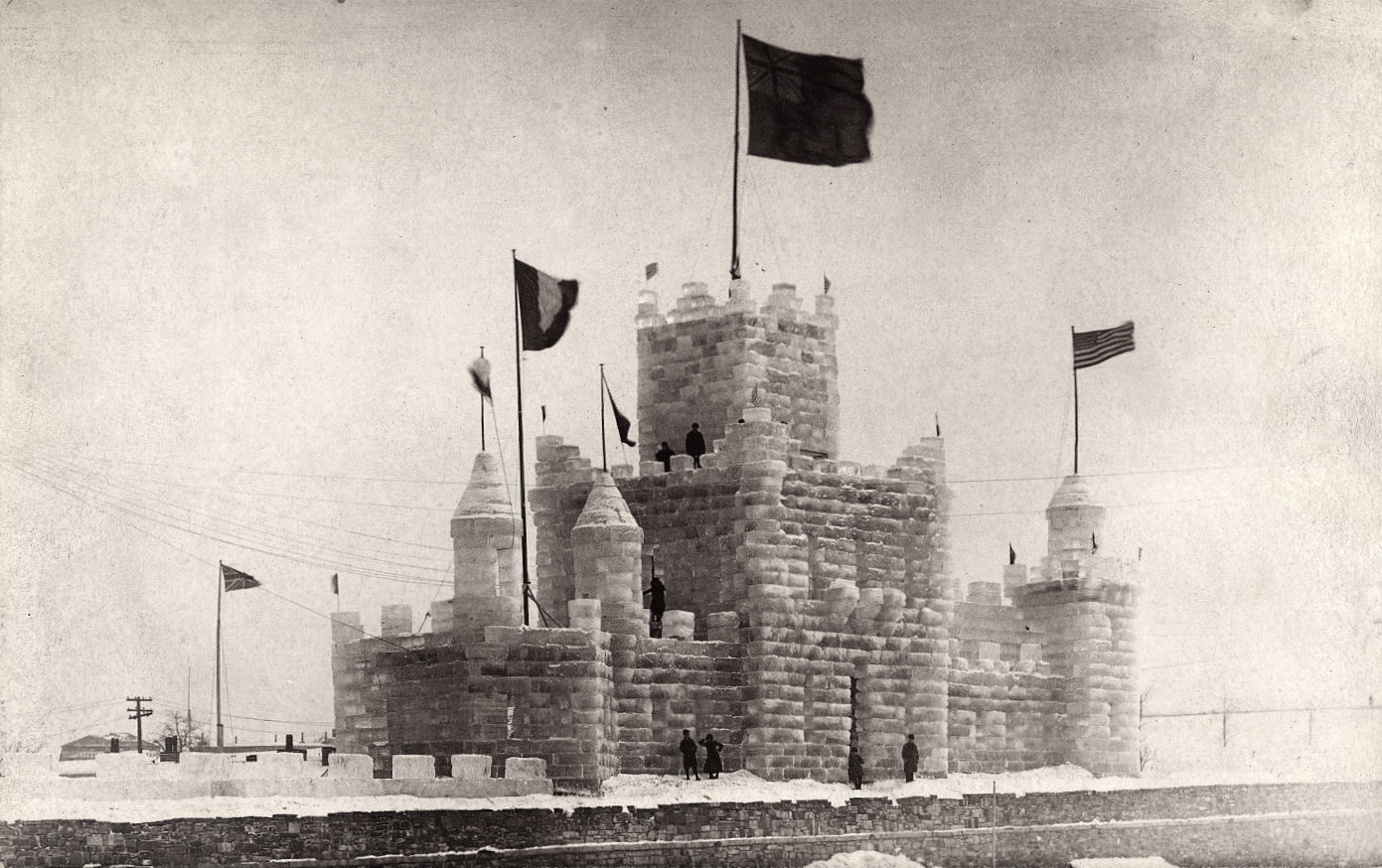 Palais de glace lors du carnaval de Québec « Du 29 janvier au 3 février 1894, Québec présentait son premier carnaval d’hiver. L’événement avait été organisé à l’initiative de Frank Carrel, éditeur du Quebec Daily Telegraph. Et le clou de cette première édition avait été le palais de glace. Il s’agissait d’une époque où on ne lésinait pas sur les blocs de glace. En effet, ce château avait été construit sur le rempart, entre l’esplanade et l’Hôtel du Parlement, et il atteignait la hauteur d’un édifice de sept étages. » – Société historique de Québec